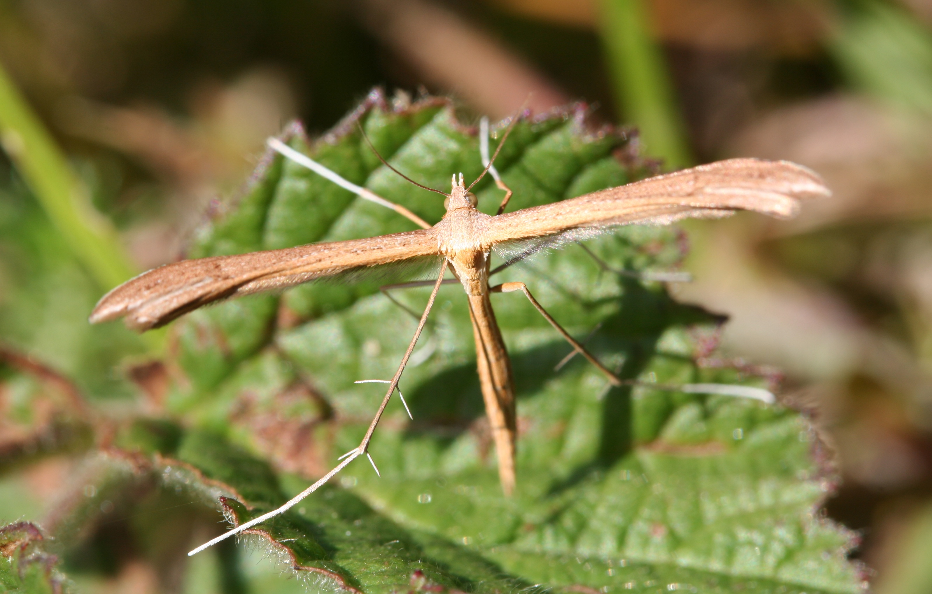 Stenoptilia_pterodactyla 17 June 2006 IJmuiden, the Netherlands (jha uhm heeft dit diertje ook een kortere naam? zo jha typ het dan want ik wil het heel graag weten groetjes Lola van Tissta) (have this animal a chorter name so yes whrite it back here plz i want to know that greetings. Lola van Tissta From NL)